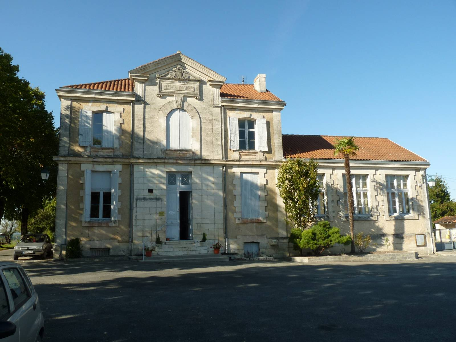 mairie de St-Paul-Lizonne (24), France